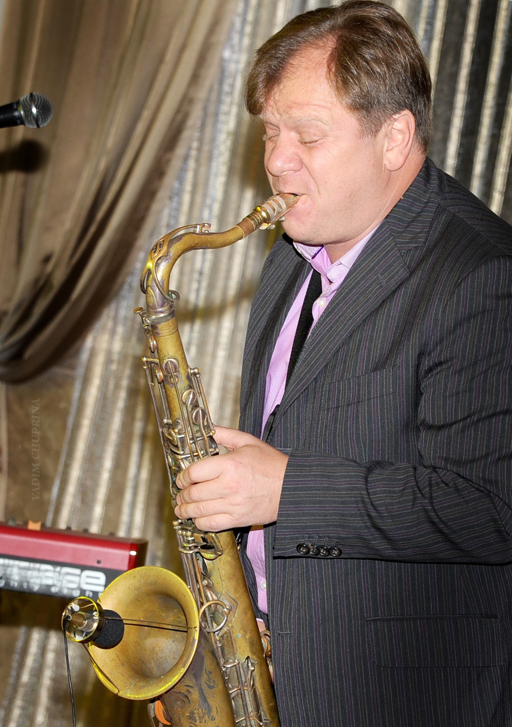 Бутман, Игорь Михайлович 2011, фото Чуприна Вадим